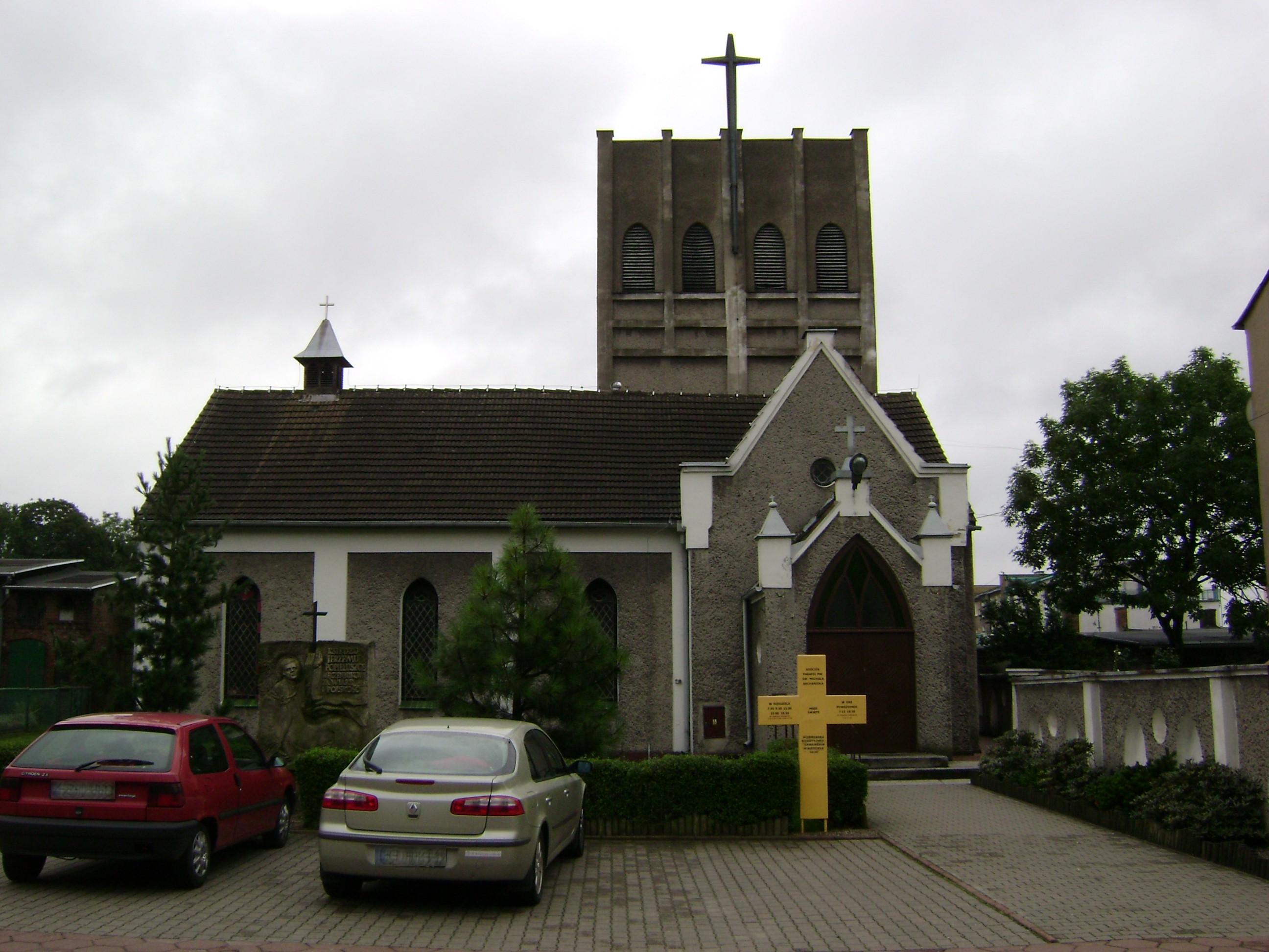 Świdwin - rzymskokatolicki kościół parafialny p.w. św. Michała Archanioła.